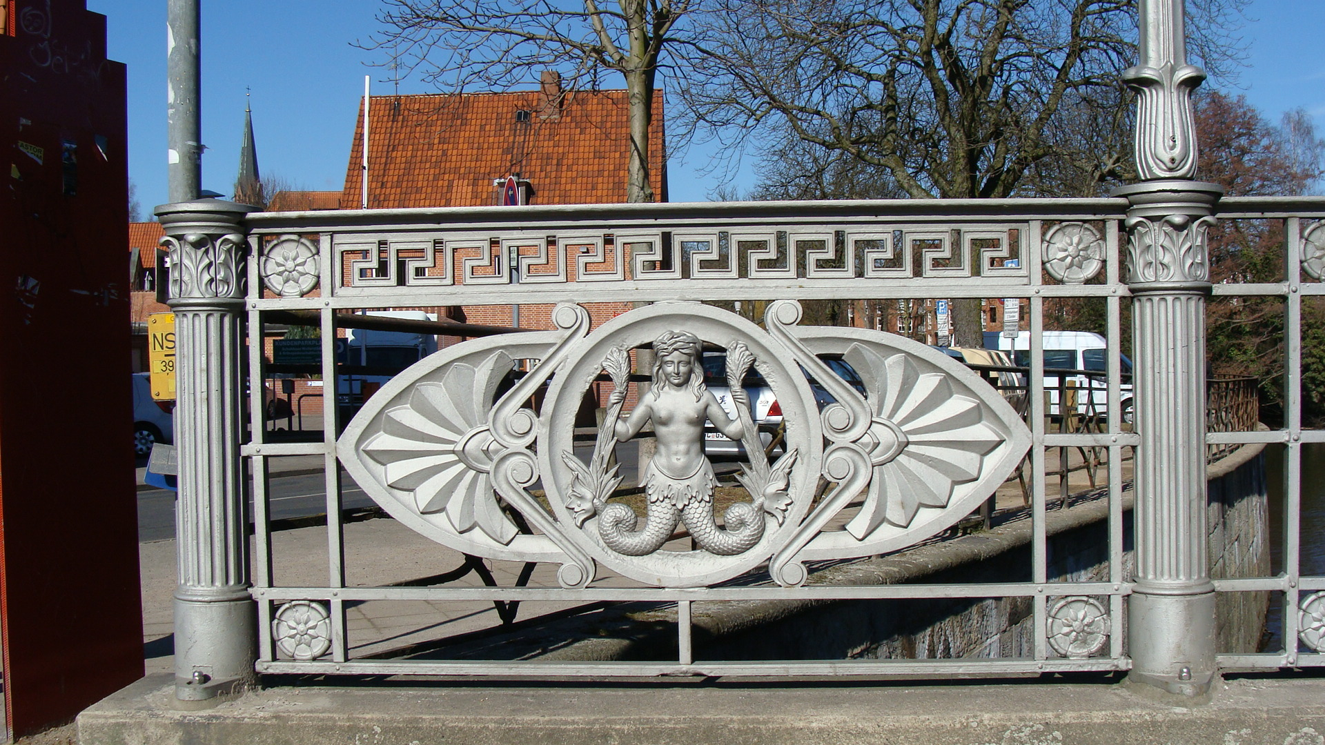 Relief on Bridge